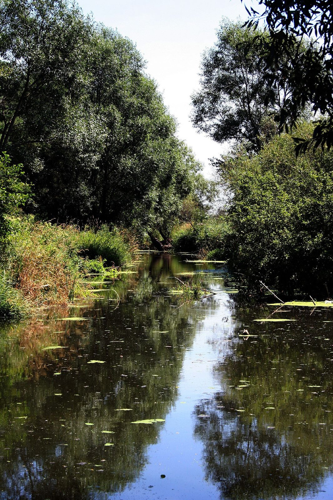 Rzeka Wschodnia, okolice miejscowości Tuczępy